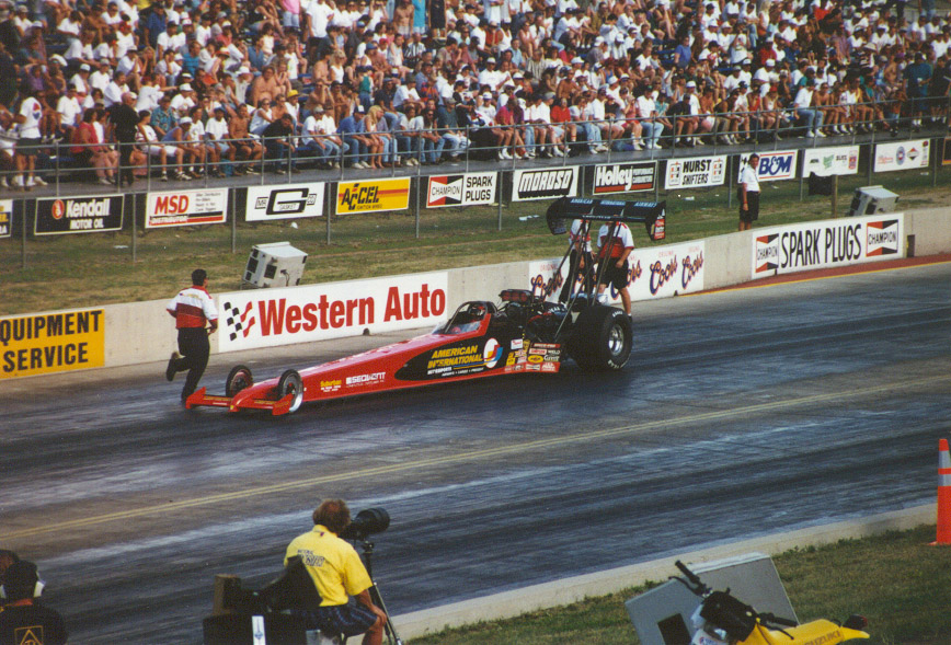 Scott Kalitta Top Fuel NHRA dragster, DenverScott Kalitta